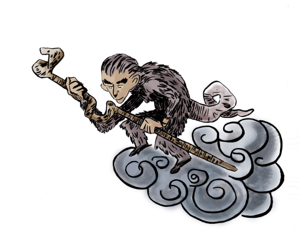 Unha das dúas formas que se coñece do ser mitolóxico Nubeiro